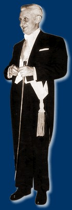 Arturo Illia with presidential band. Arturo Illia con banda presidencial